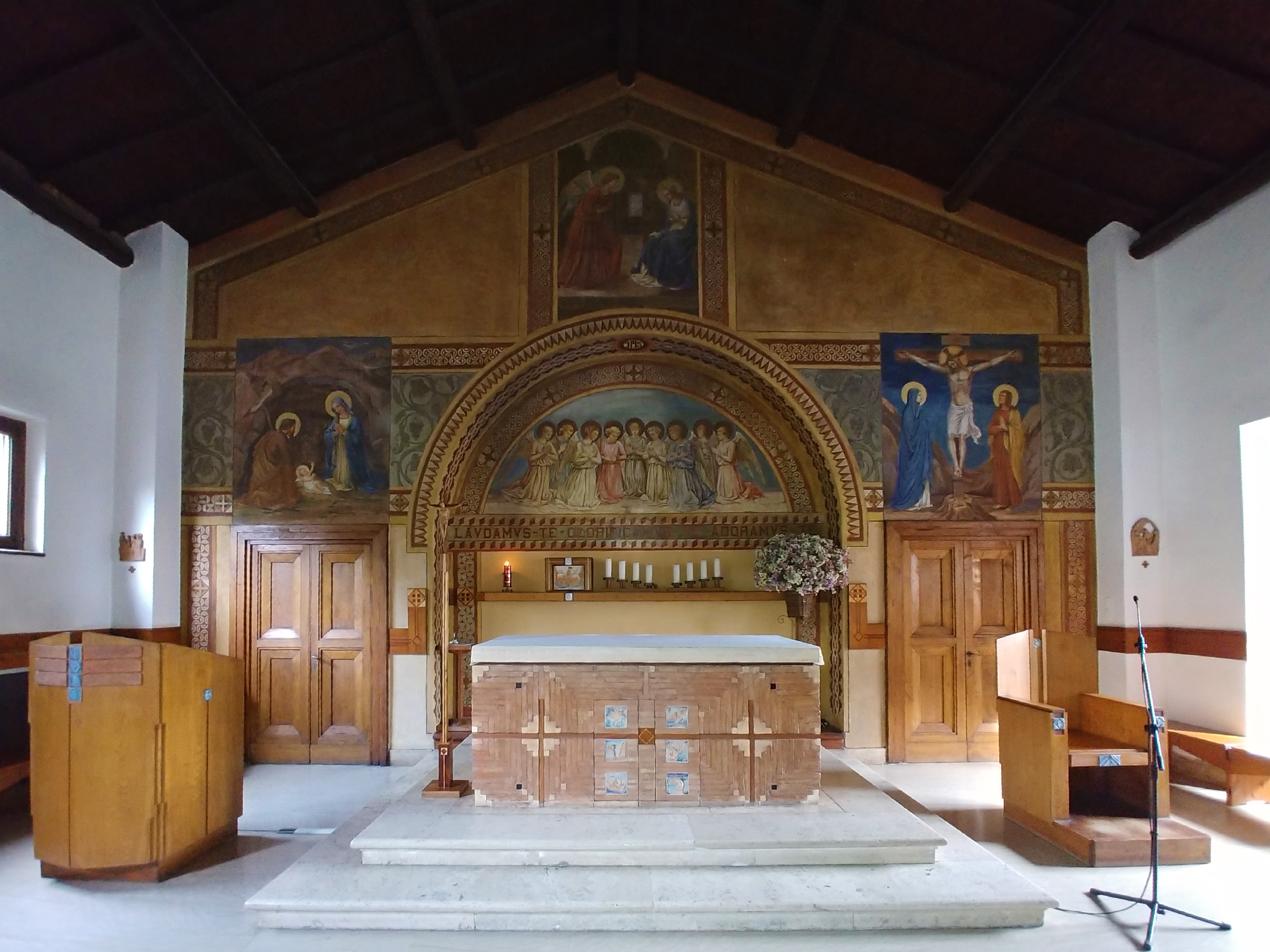 Presbiterio.